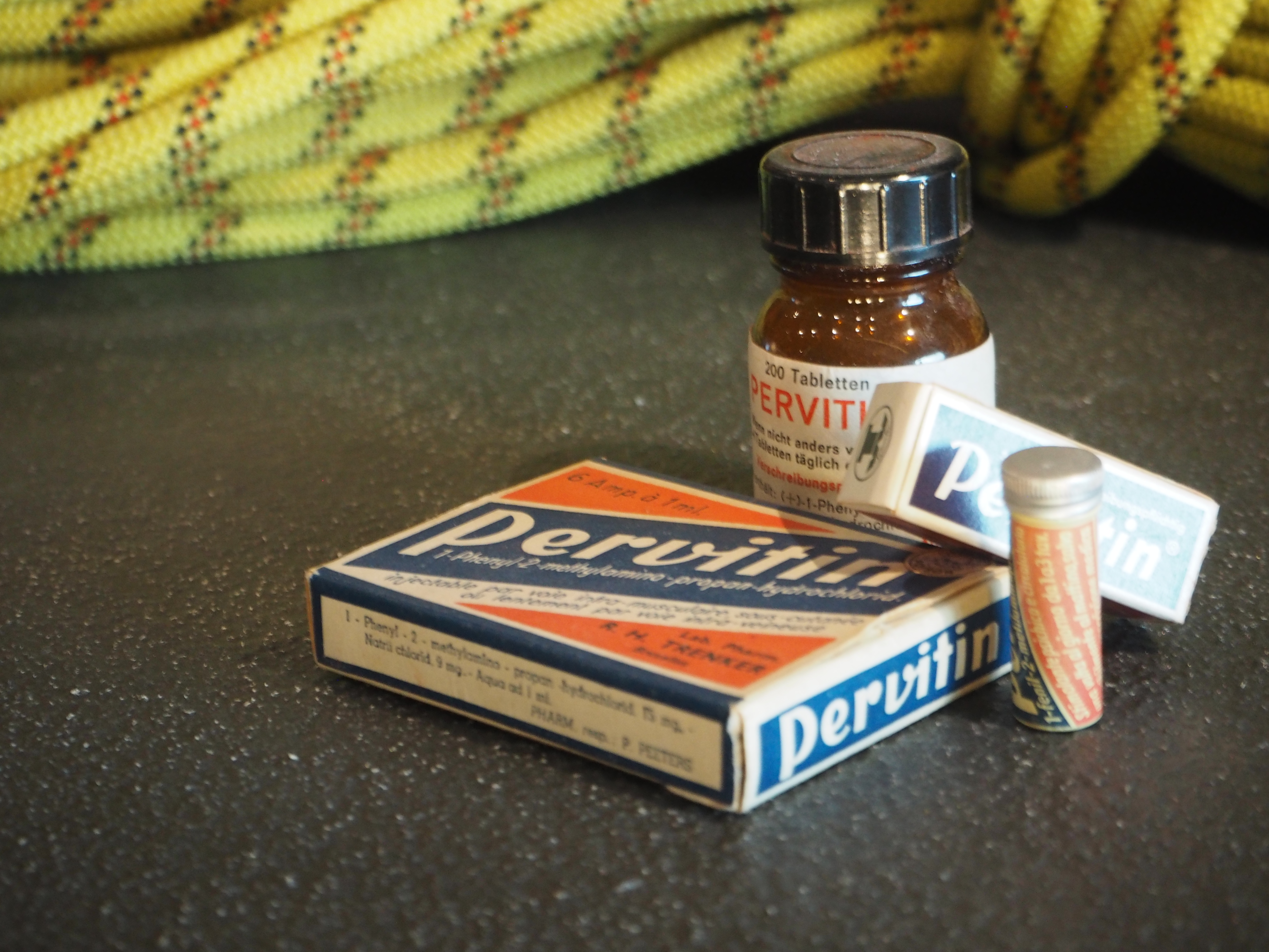 Pervitin in verschiedenen Darreichungsformen aus Hochgebirgs-Expeditionsausrüstungen in der Ausstellung des Messner Mountain Museum Corones